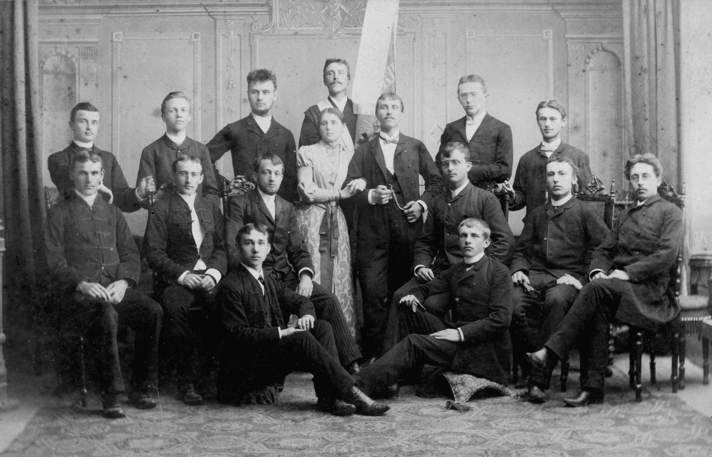 Merendní výbor roku 1888